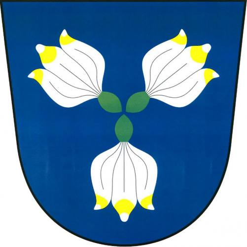 znak, Tasovice, okres Blansko